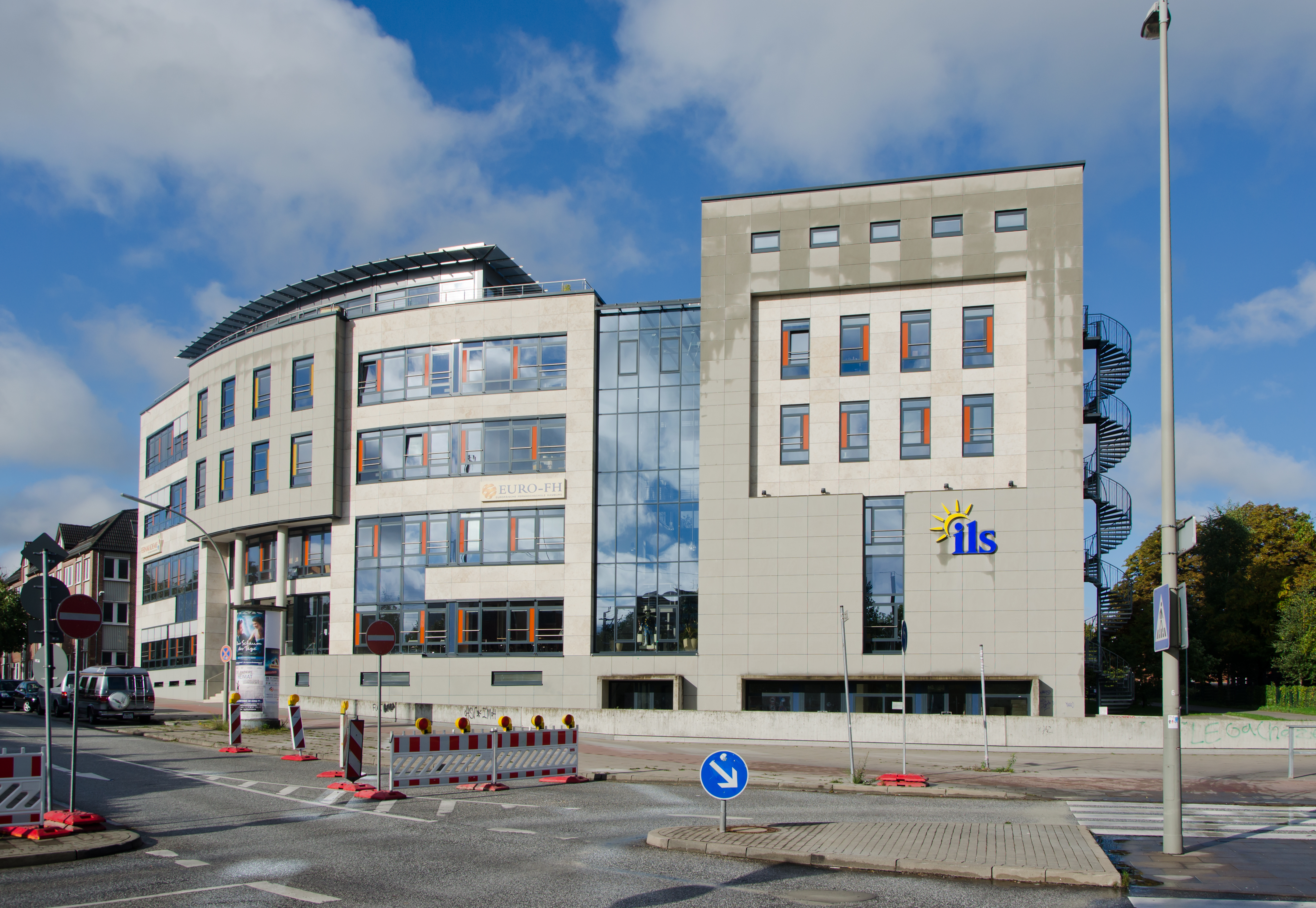 ILS Hamburg-Rahlstedt